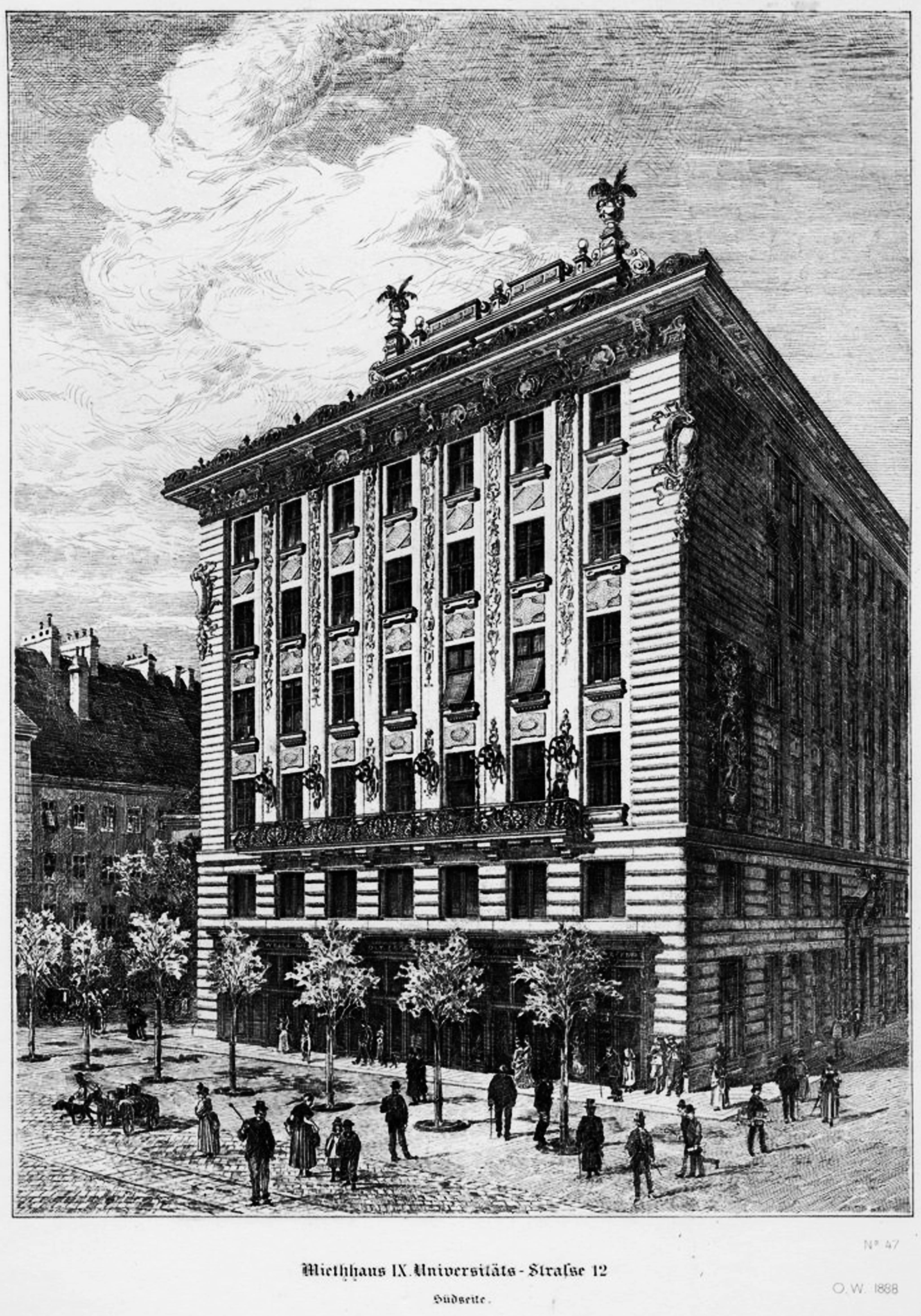 Будинок на Універзітетсштрасе. Відень. Перспектива.